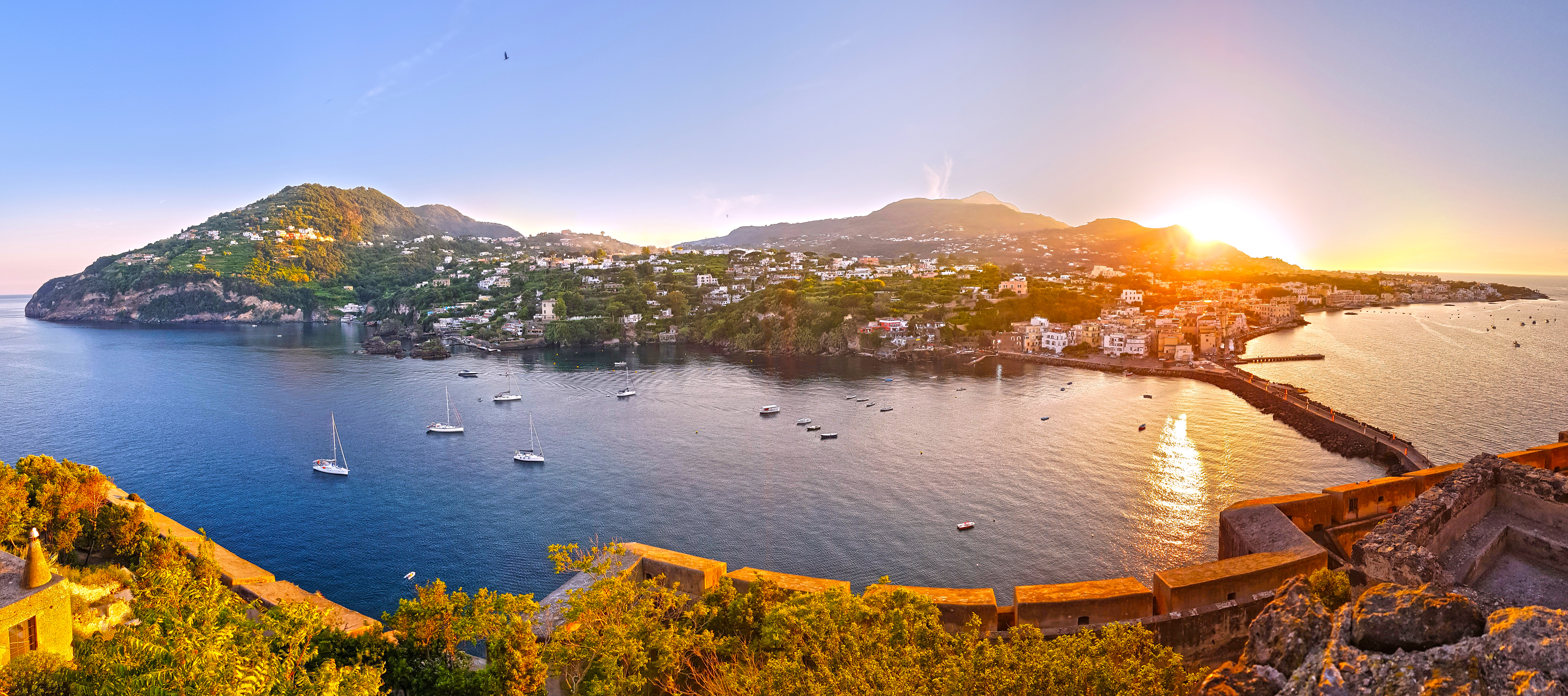 Vista sull'isola di Ischia da una delle terrazze del Castello Aragonese This is a photo of a monument which is part of cultural heritage of Italy.